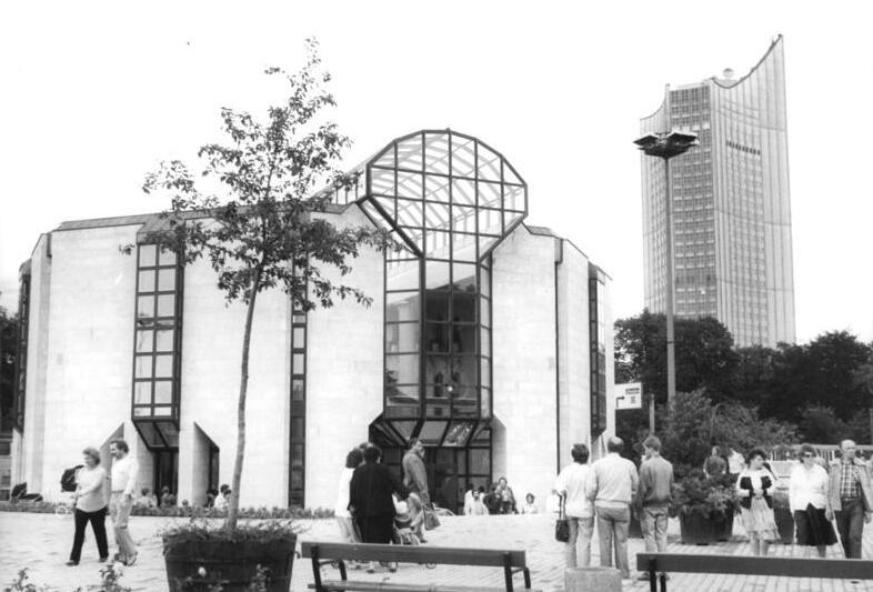 ADN-ZB-Kluge 27.7.1987 Leipzig: Sportfest - Bowlingzentrum eröffnet Das Sportfestobjekt "Bowlingtreff Leipzig" auf dem Wilhelm-Leuschner-Platz wurde am 25.7.87 seiner Bestimmung übergeben. Das Objekt verfügt über 14 Bowlingbahnen in zwei Hallen, zehn Fitnessplätze, fünf Billardtische, sechs Spielautomaten und 310 Gaststättenplätze.